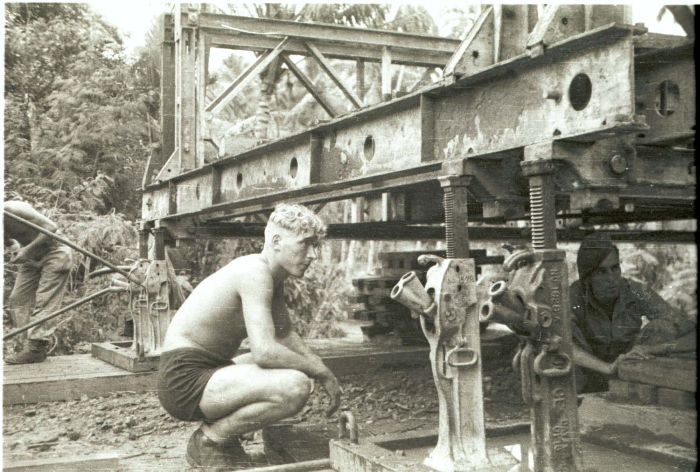 negatief. Aanleg van een baileybrug door de genie